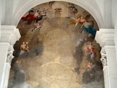 Vue intérieure de l'abbatiale de Bellelay - peintures sur stuc